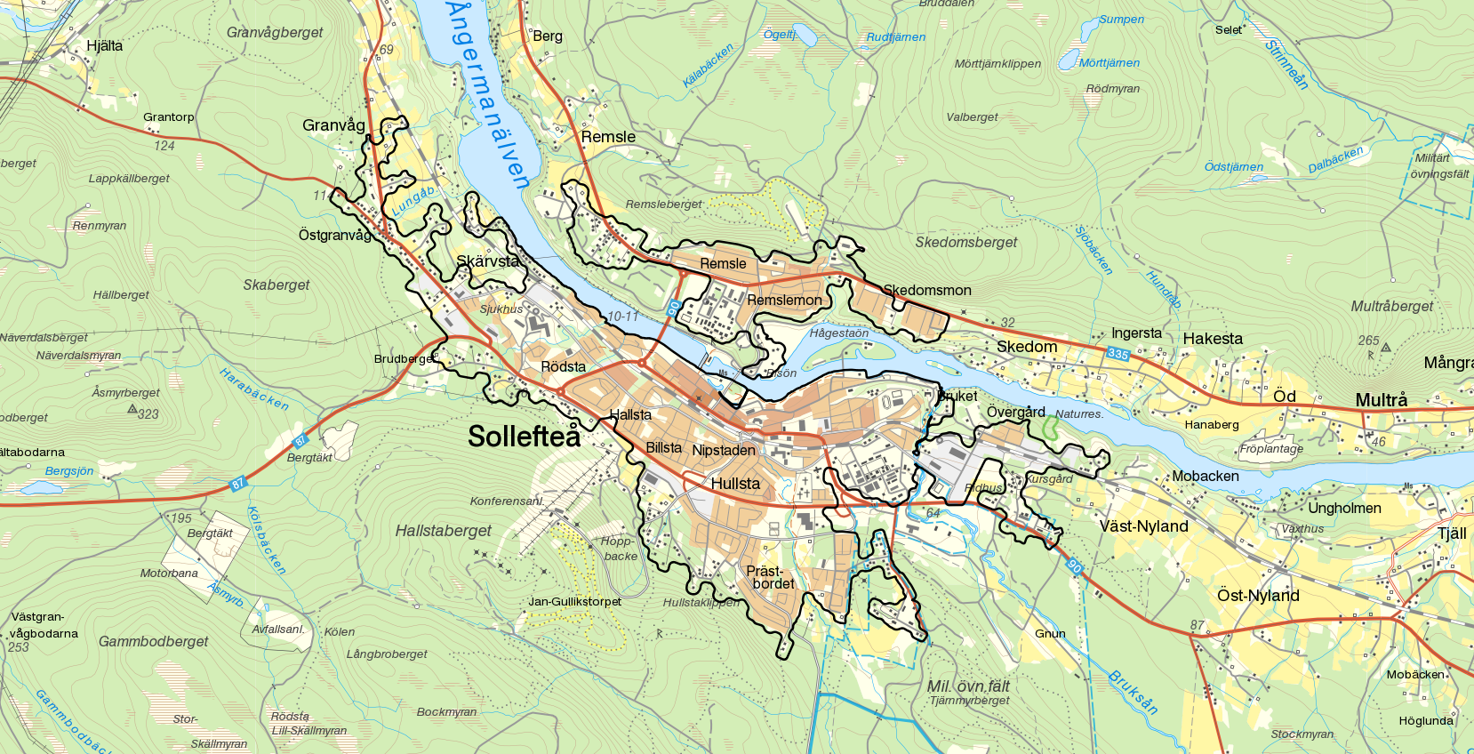 Tätortena Sollefteå och Sollefteå norra med gränserna från Statistiska centralbyråns tätortsavgränsning 2015. Bakgrundskarta från Lantmäteriet, skala 1:30 236.